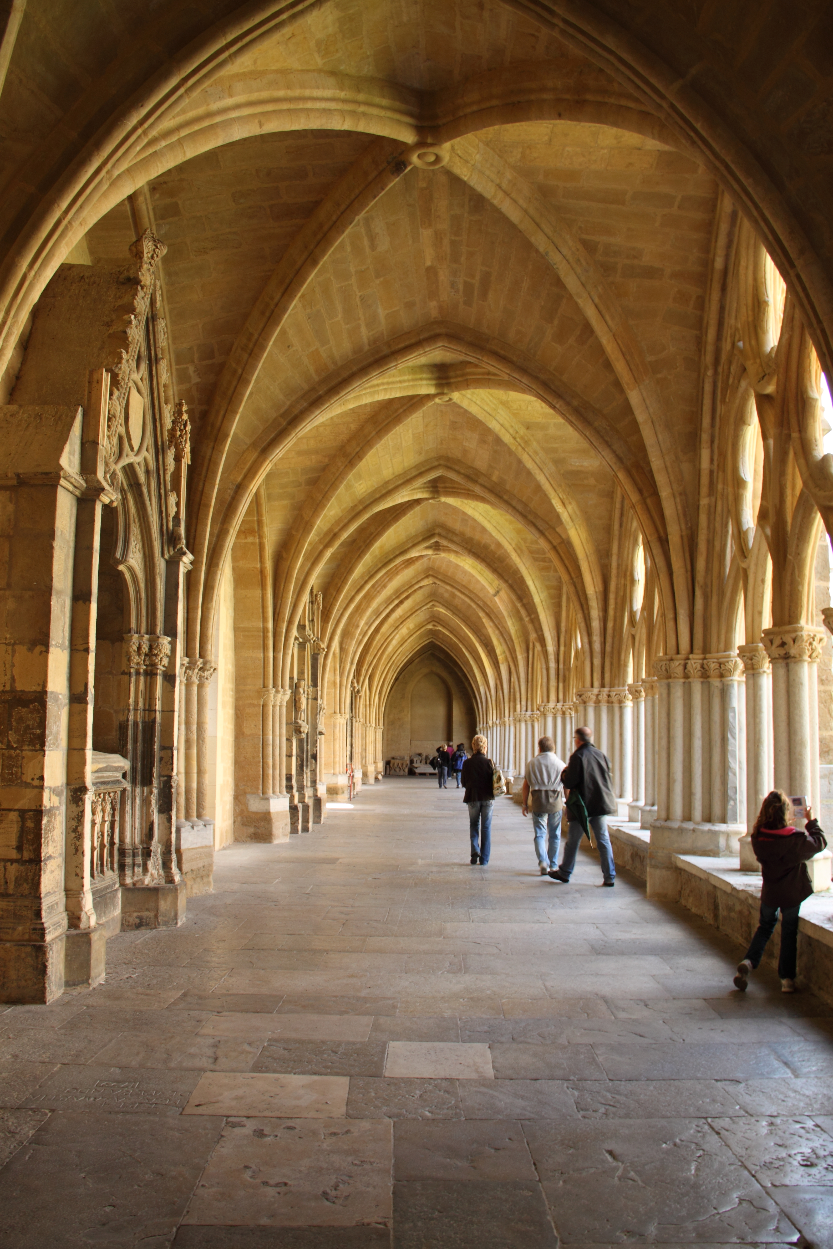 Couloir du cloître de la cathédrale Notre-Dame de Bayonne